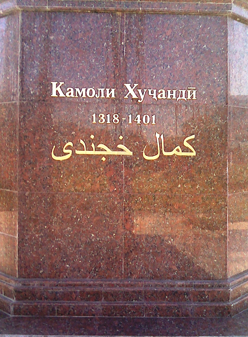 Надпись у постамента памятника поэту Камолу Худжанди, г. Худжанд